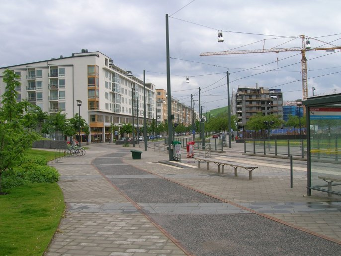 Hammarby Allé, Södra Hammarbyhamnen, Stockholm, Sweden